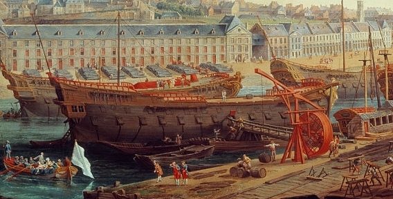 Le vaisseau l'Éveillé de 64 canons à quai à Brest sur la rive droite, peu après sa construction (1771-1772). Vaisseau en service jusqu'en 1786. Détail d'un tableau de Louis Nicolas Van Blarenberghe.